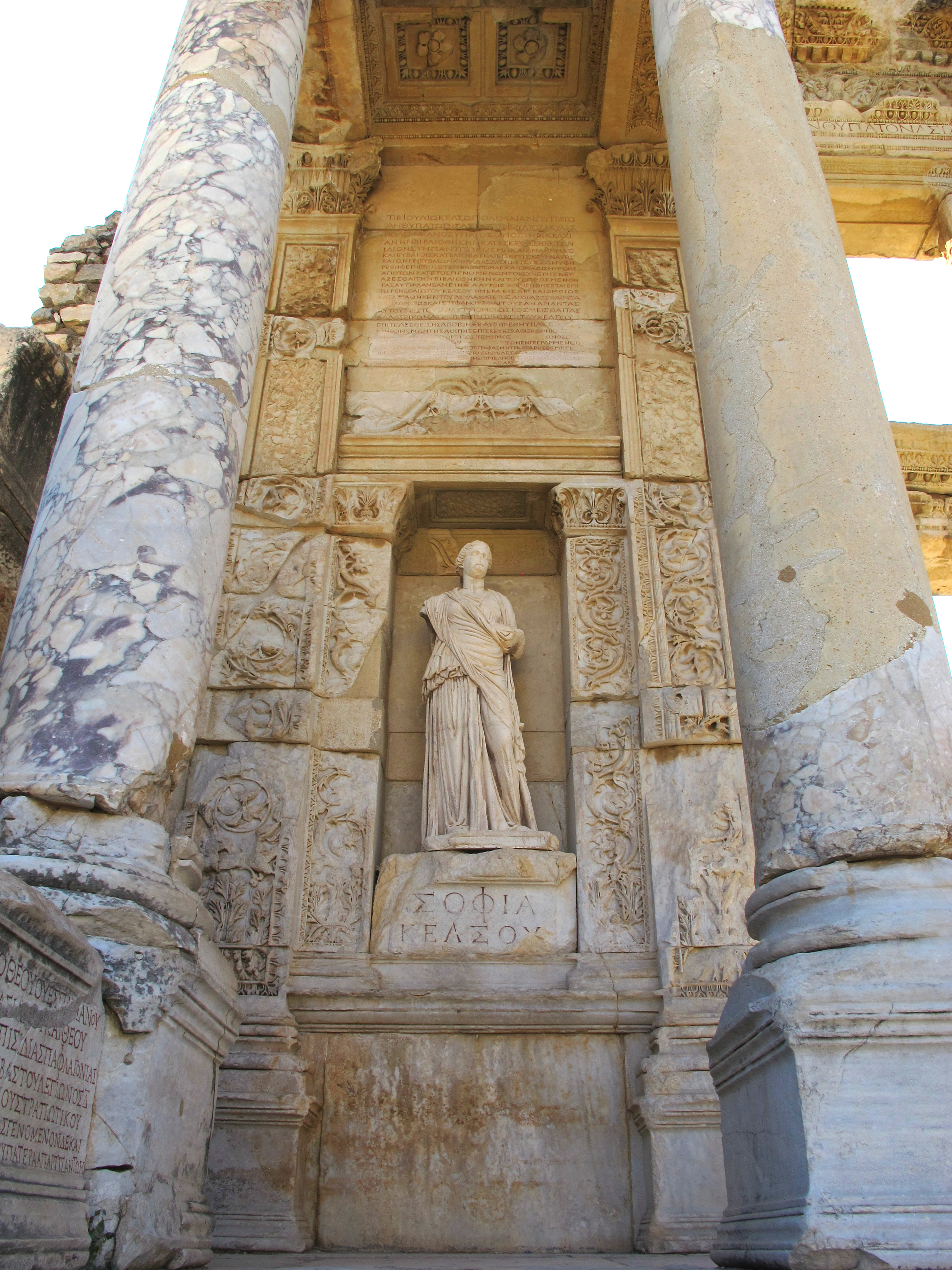 Efeso, biblioteca di celso